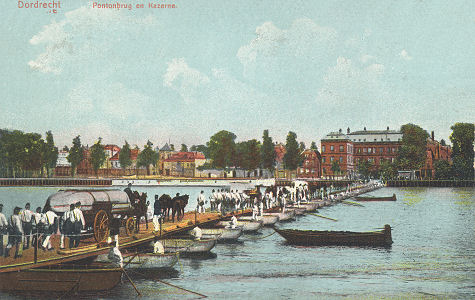 Ansichtkaart van rond 1900